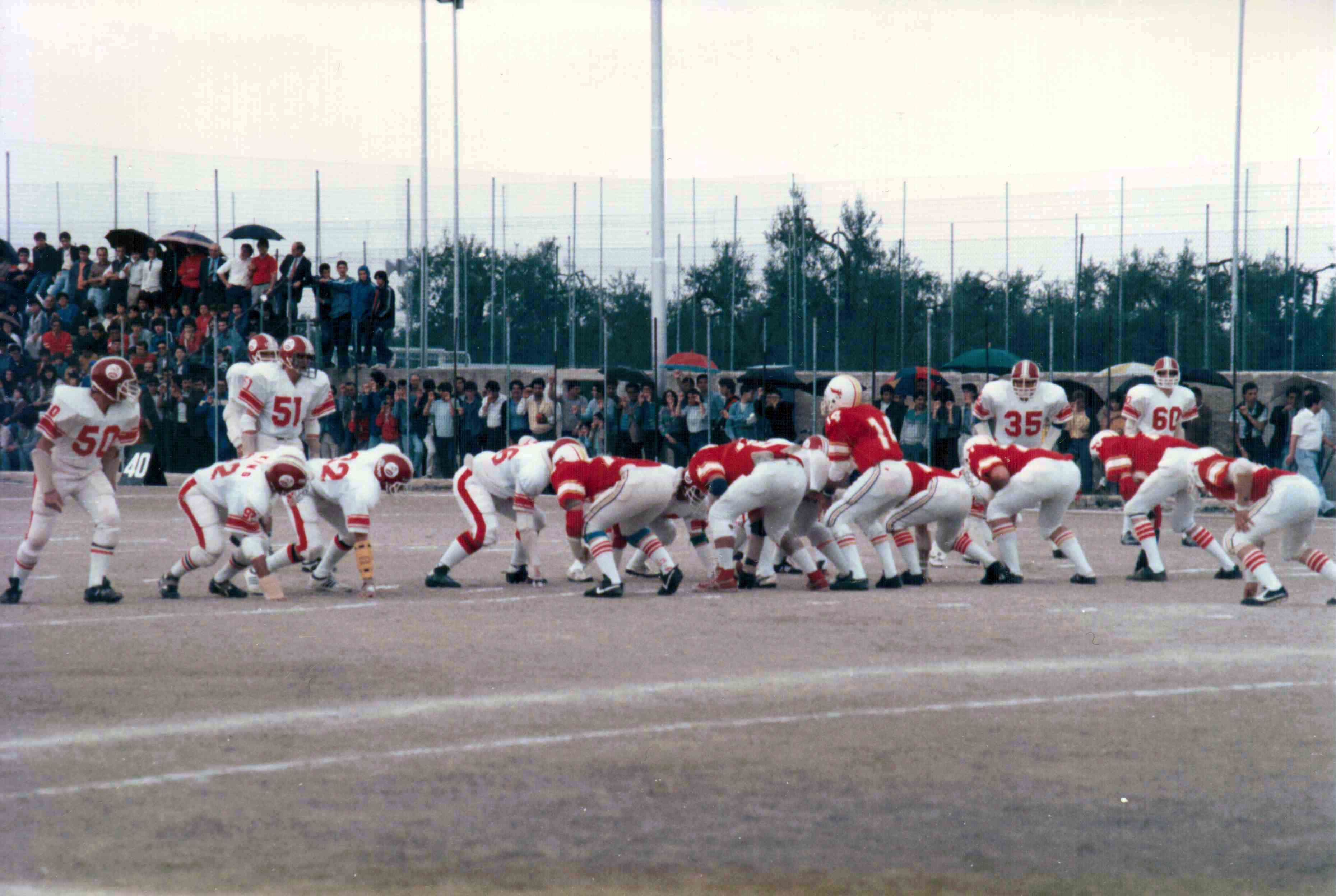 Palermo cardinals-Bari roosters in amichevole nel campo Lavermicocca di Bari